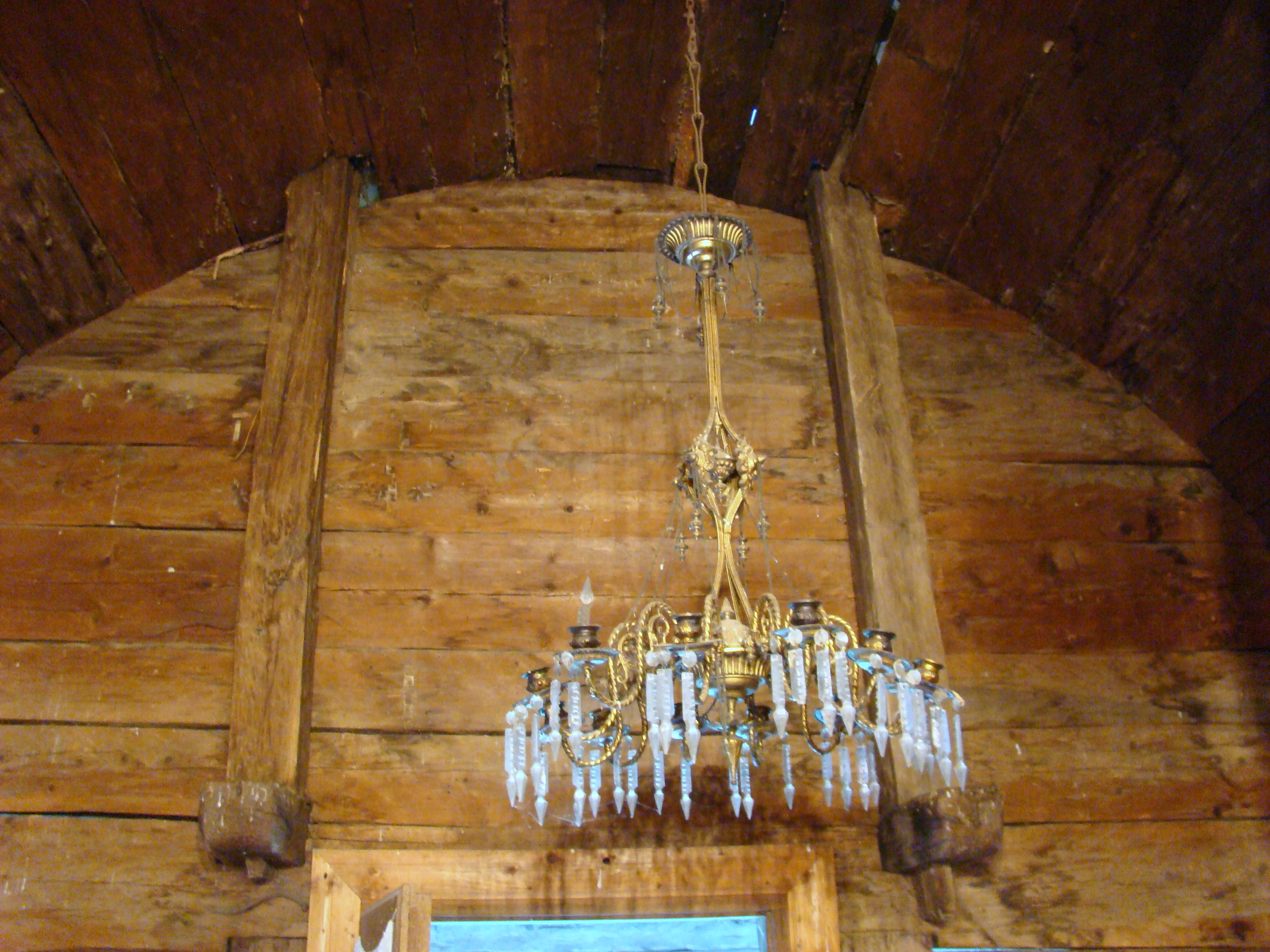 Biserica de lemn „Adormirea Maicii Domnului”, sat Vaidei; comuna Stănești